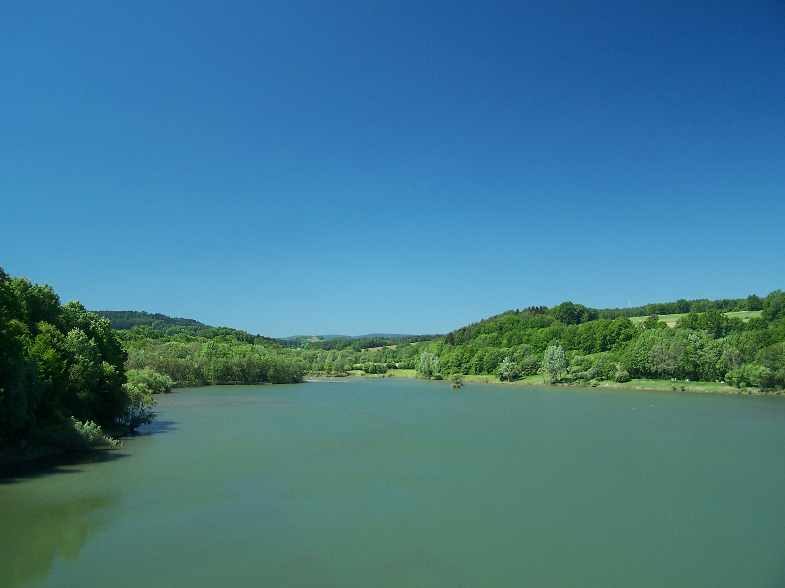 Froschgrundsee bei Schönstädt/Rödental